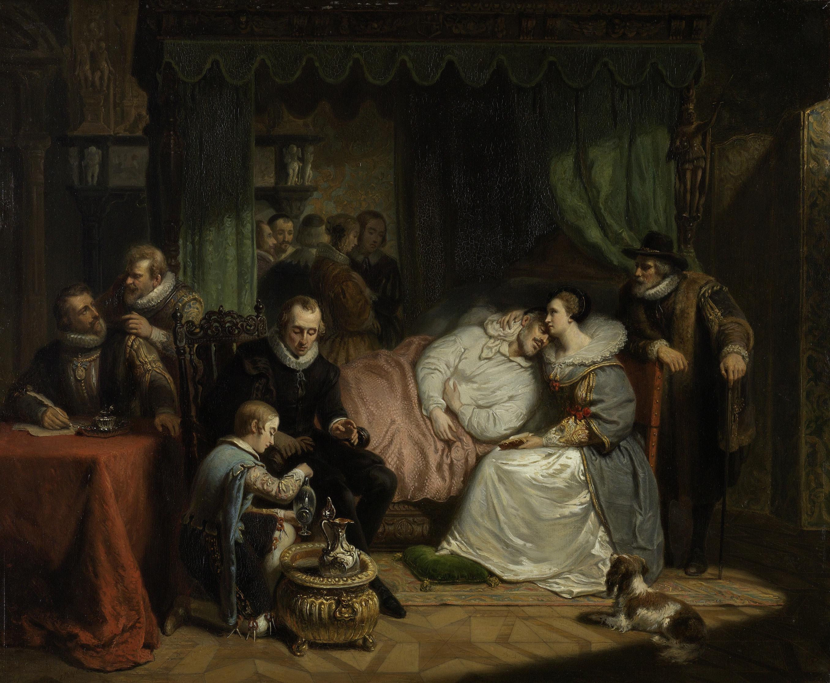 Prins Willem I, na de mislukte moordaanslag door Jean Jauregui in 1582, verpleegd door Charlotte de Bourbon. De prins ligt gewond in bed, om het bed hebben familie en vrienden zich verzameld. Links schenkt een jongen een glas in, rechts een hondje.